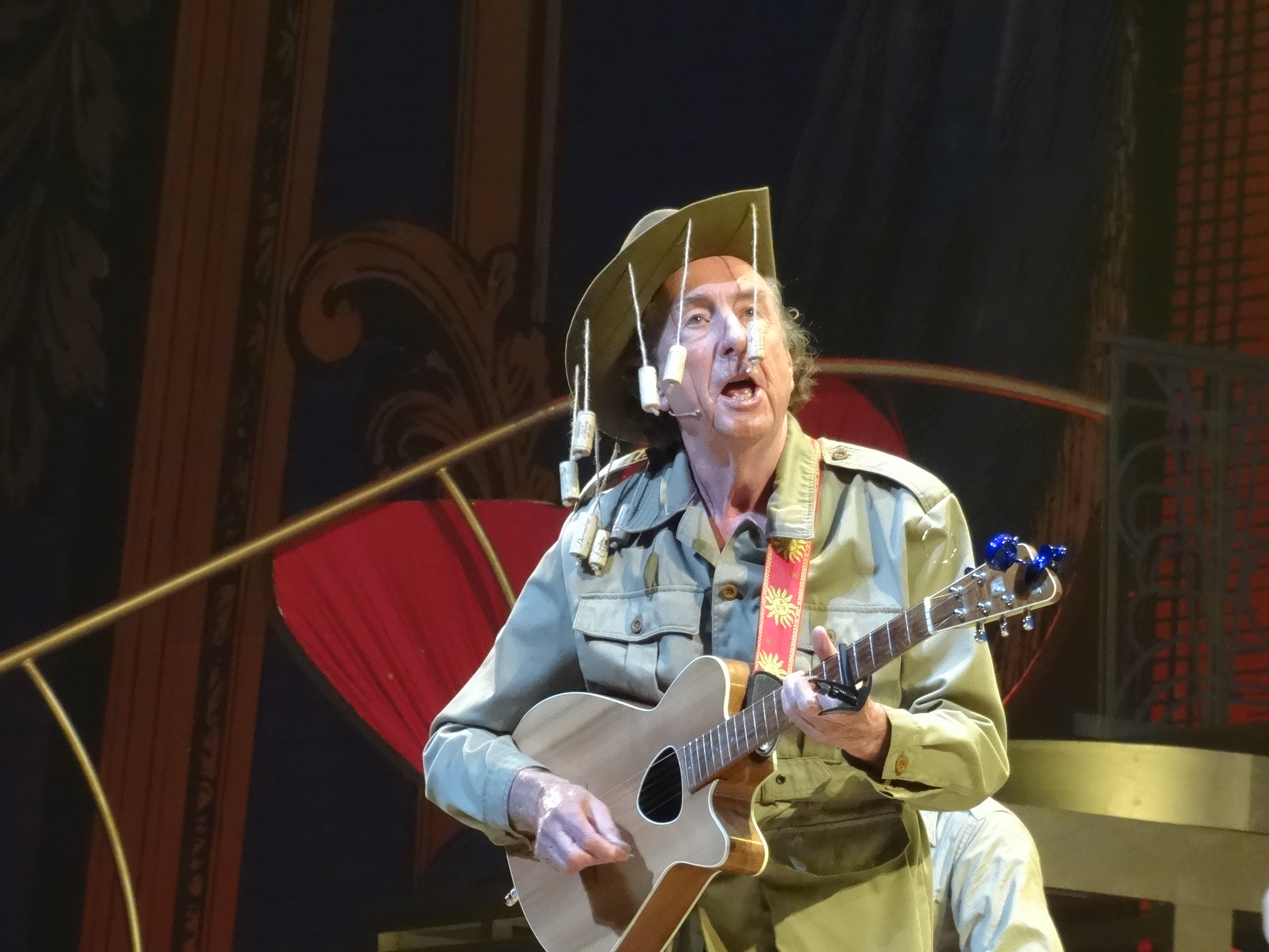 Photo 02-07-14 11 29 34